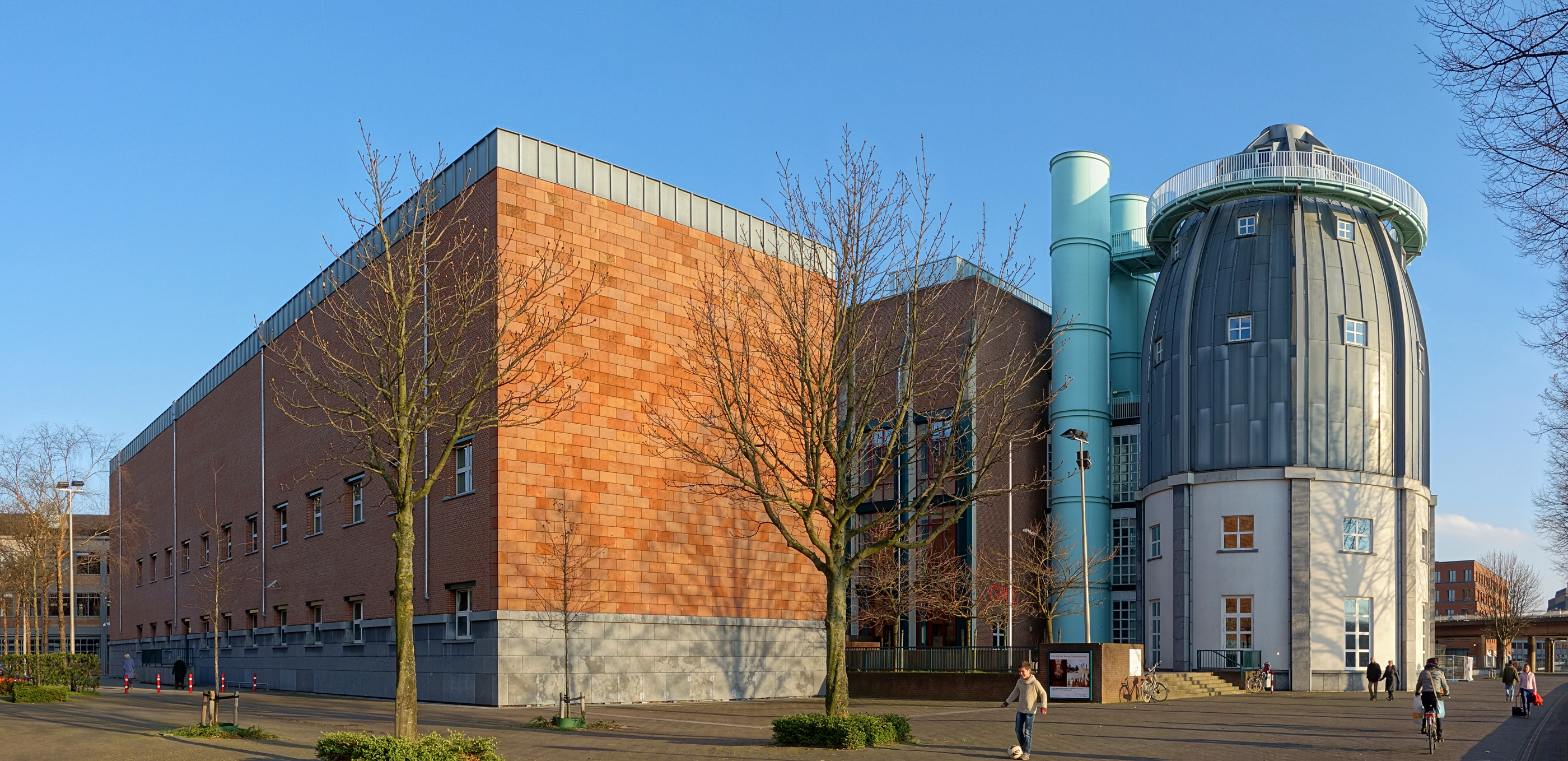 Vue du Bonnefantenmuseum depuis les berges de la Meuse.